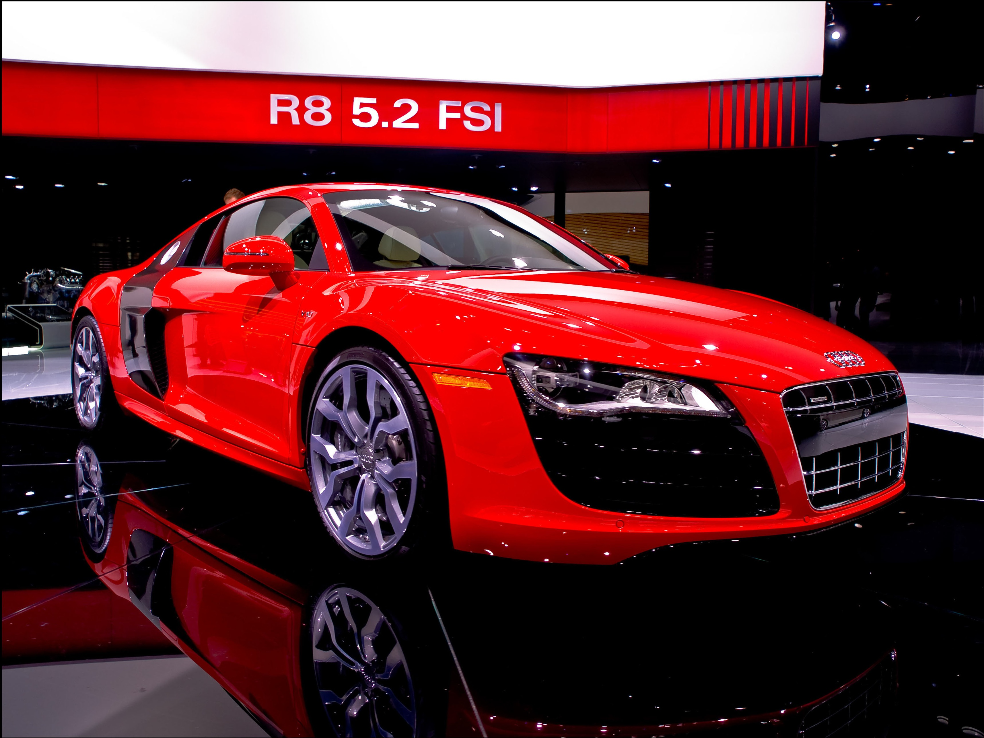 Audi R8 V10 au NAIAS Détroit 2009